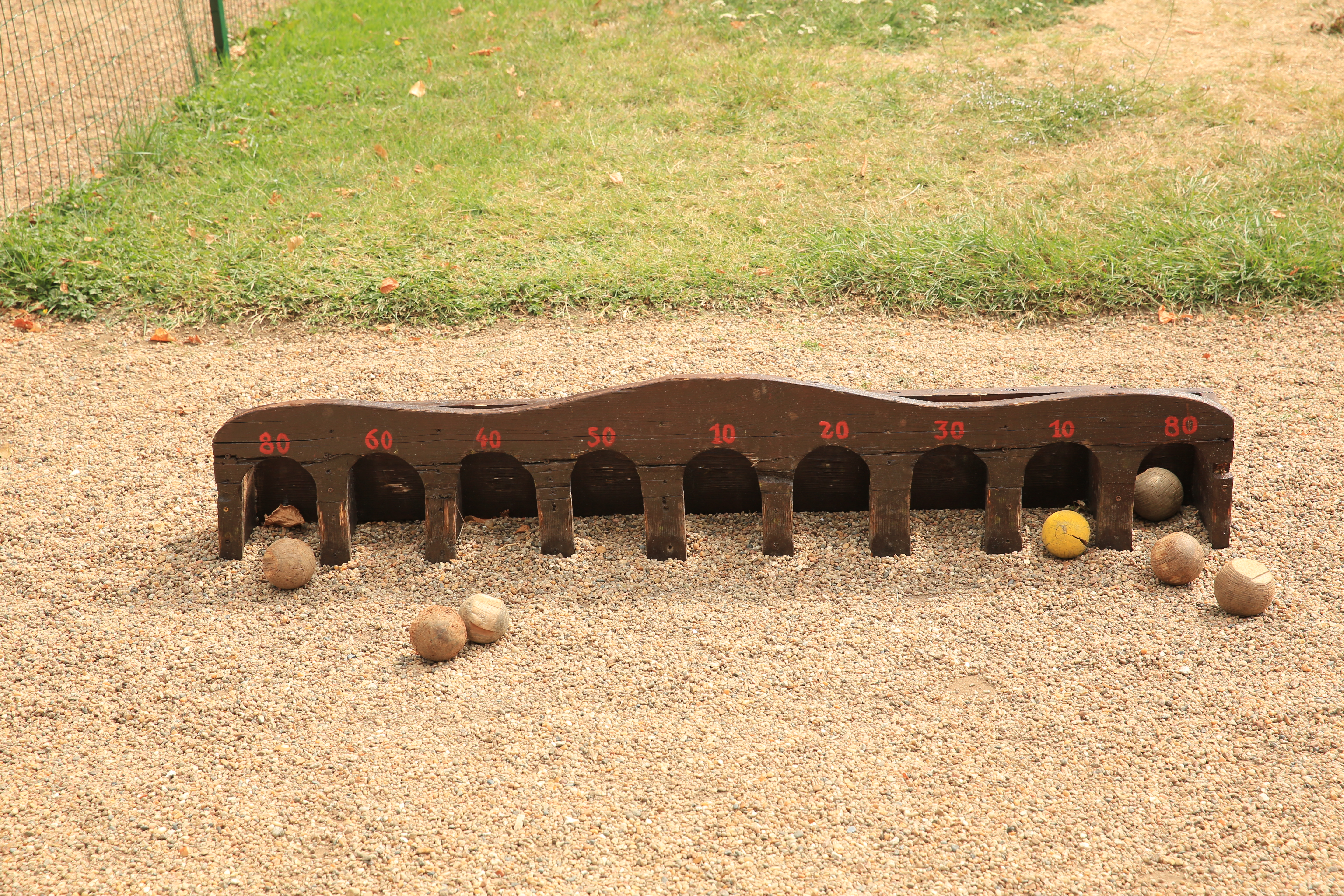 Trou madame. Jeu traditionnel en bois à l'entrée du Domaine de Chanteloup. Il faut lancer les boules plates d'une distance de trois à quatre mètres pour les faire entrer dans un des neuf trous.